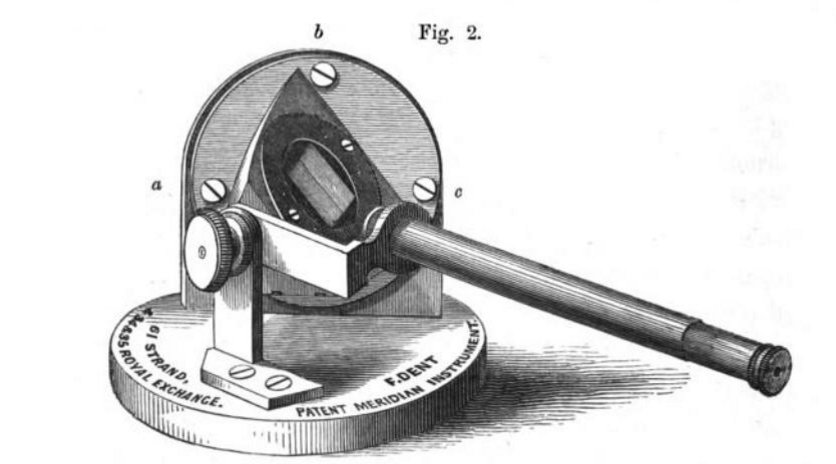 Dipleidoscopio de Edward John Dent (1790–1853) Imagen de su obra: Título A Description of the Dipleidoscope, Or Double-reflecting Meridian and Altitude Instrument: With Plain Instructions for the Method of Using it in the Correction of Time-keepers, Volumen 7 A Description of the Dipleidoscope, Or Double-reflecting Meridian and Altitude Instrument: With Plain Instructions for the Method of Using it in the Correction of Time-keepers, Edward John Dent Autor Edward John Dent Edición 8 Publicado en 1867 Procedencia del original Universidad de Oxford Digitalizado 6 Ene 2009 N.º de páginas 29 páginas